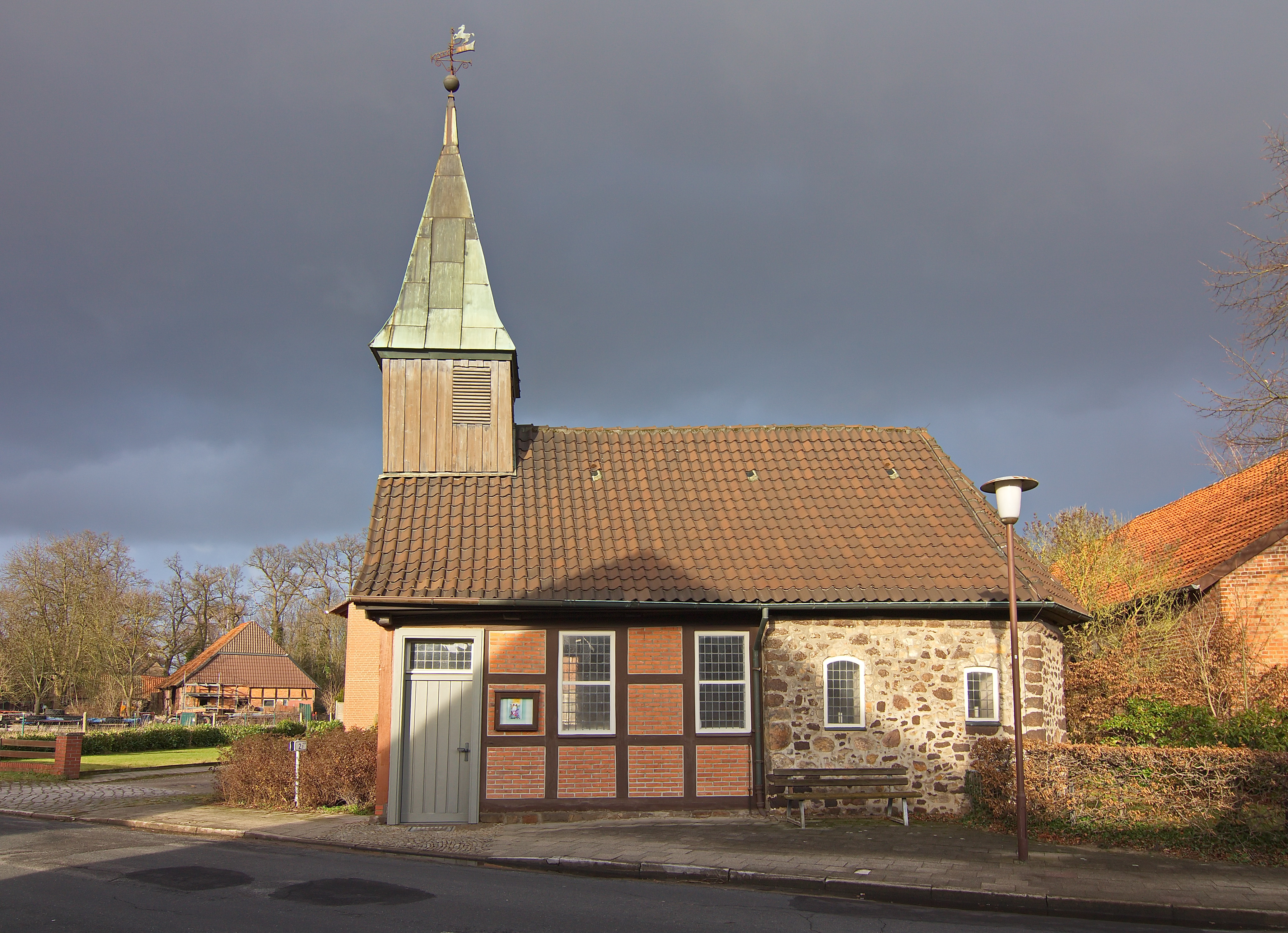 Die Errichtung der Markuskapelle in Blumenhagen (Edemissen) erfolgte im Jahr 1534 als Bruchsteinbau, den man ca. 200 Jahre später in Fachwerkbauweise erweiterte.